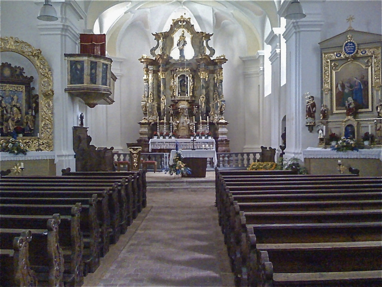 Innenansicht der Mutter-Anna-Kirche in Neustadt a.d. Waldnaab (Mühlberg)